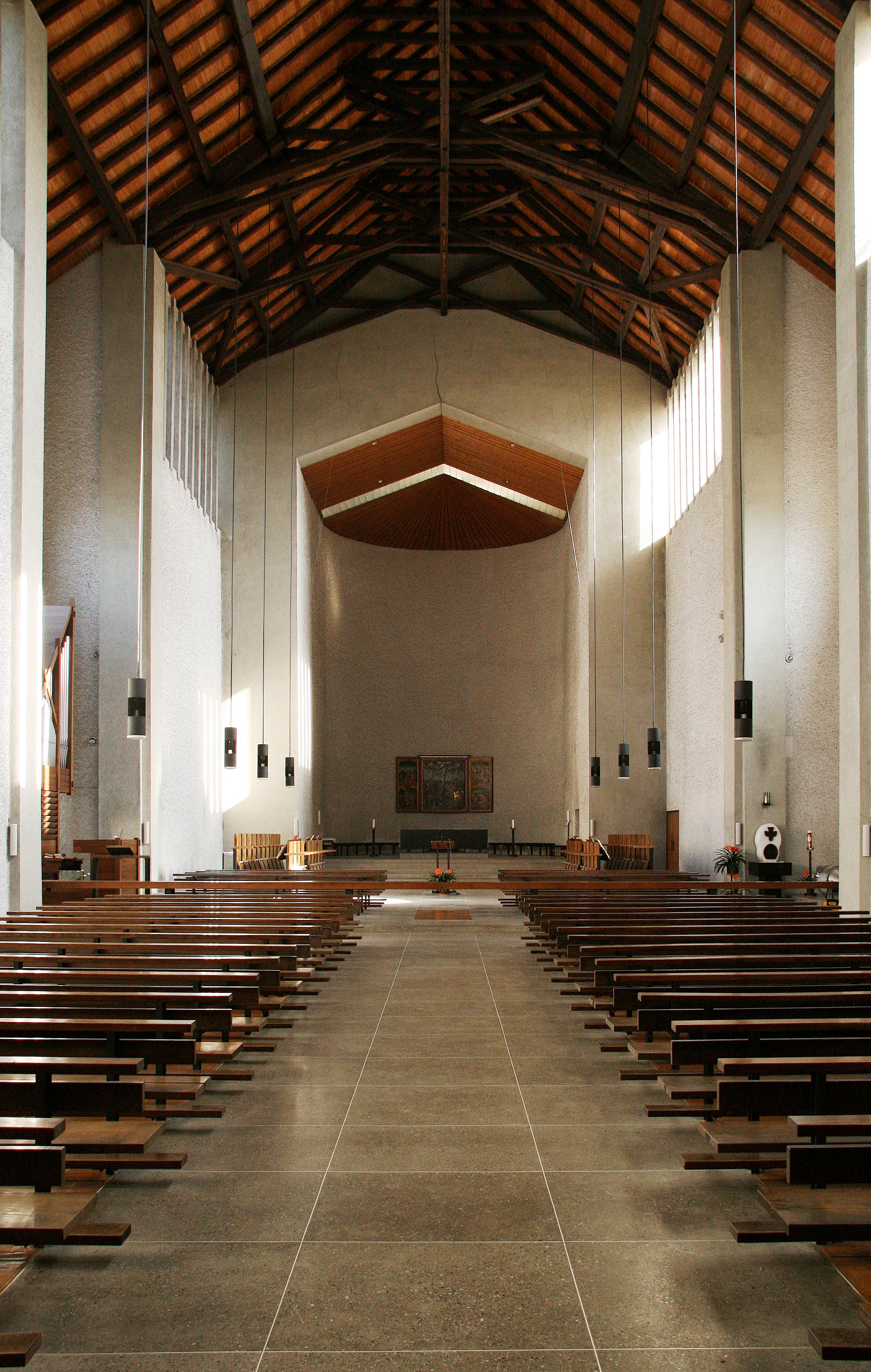 Klosterkirche Mehrerau, Bregenz (Vorarlberg), nach dem grundlegenden Umbau von Hans Purin 1961–1964